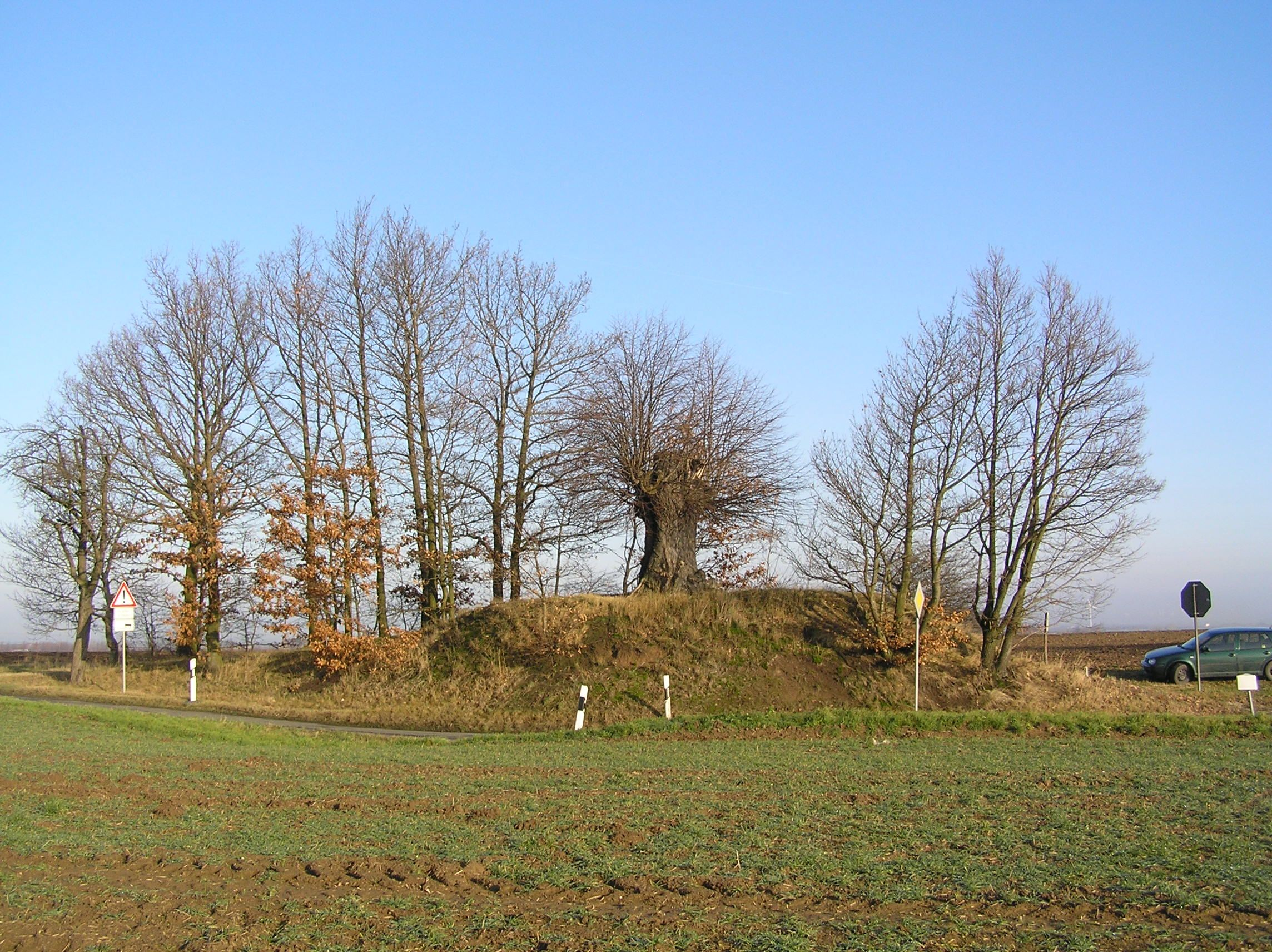 Hünengrabhügel in Lumpzig